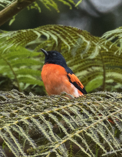 Sunda Minivet - Gunung Gede - West Java_MG_3857